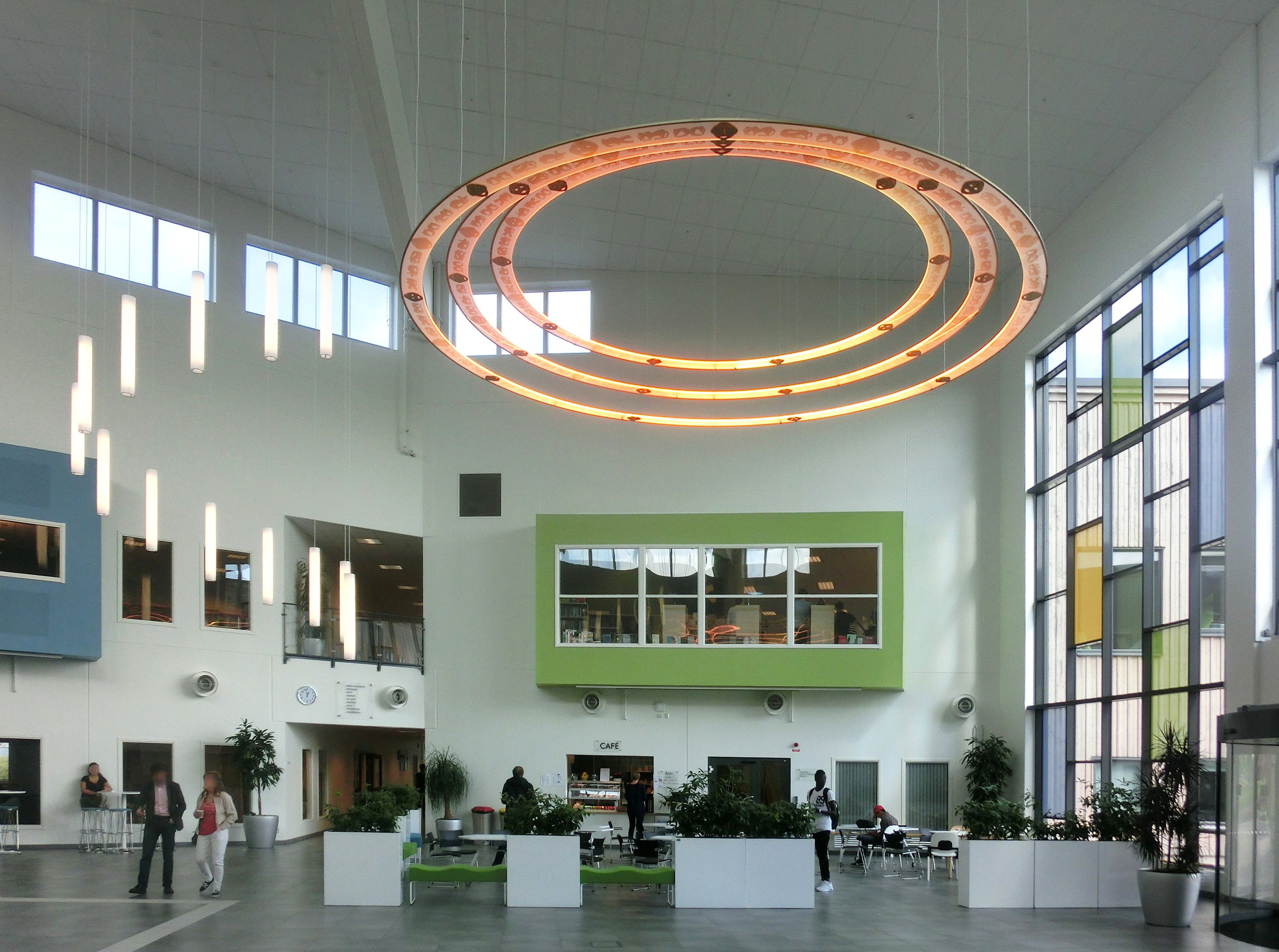 Entréhallen på Ållebergsgymnasiet i Falköping, f.d. Skaraborgs län, Västergötland, Västra Götalands län, Sverige. Ållebergsgymnasiets nya huvudbyggnad invigdes hösten 2012.